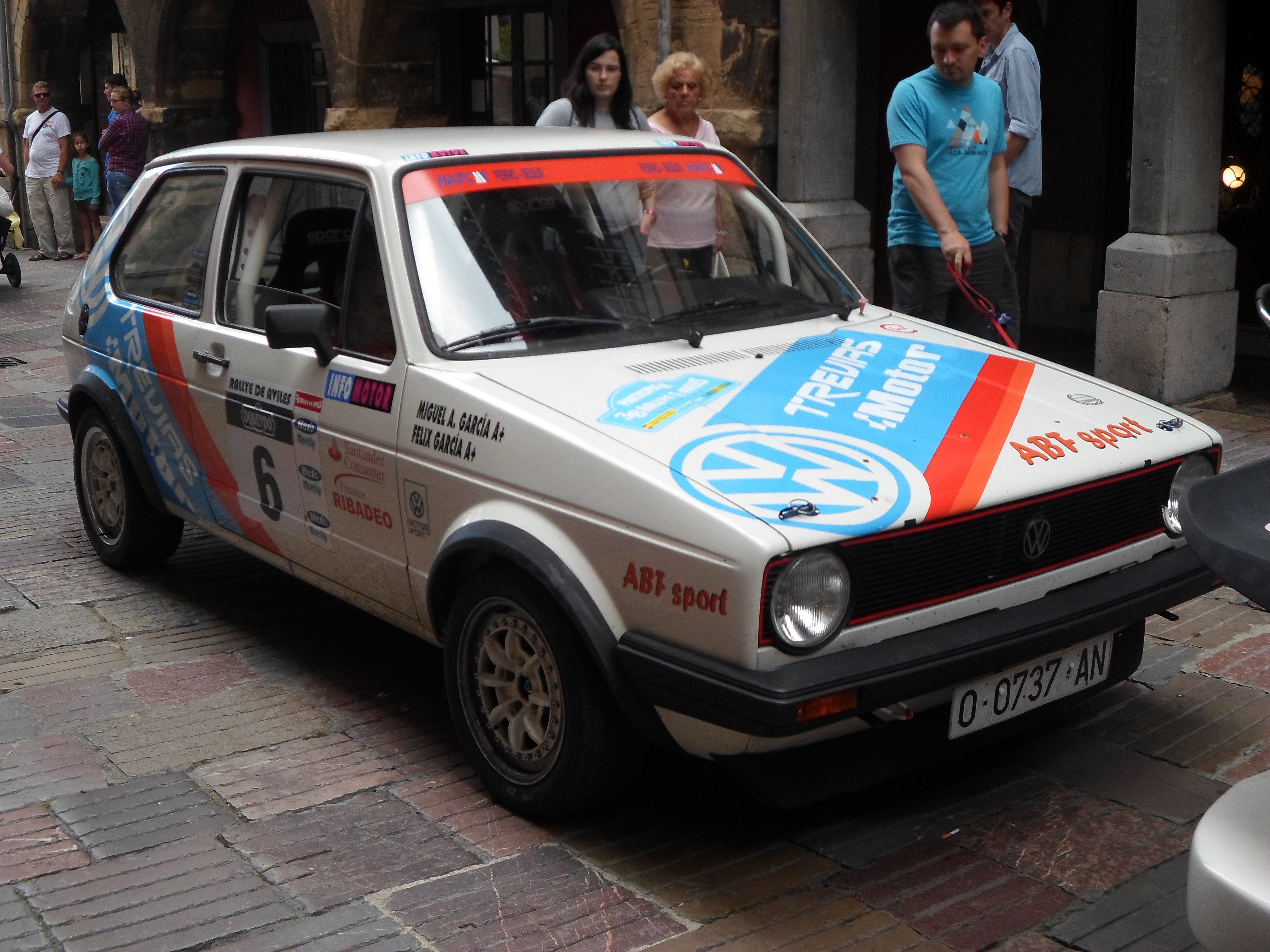 Félix García (VW Golf GTI) en el rally de aviles 2014